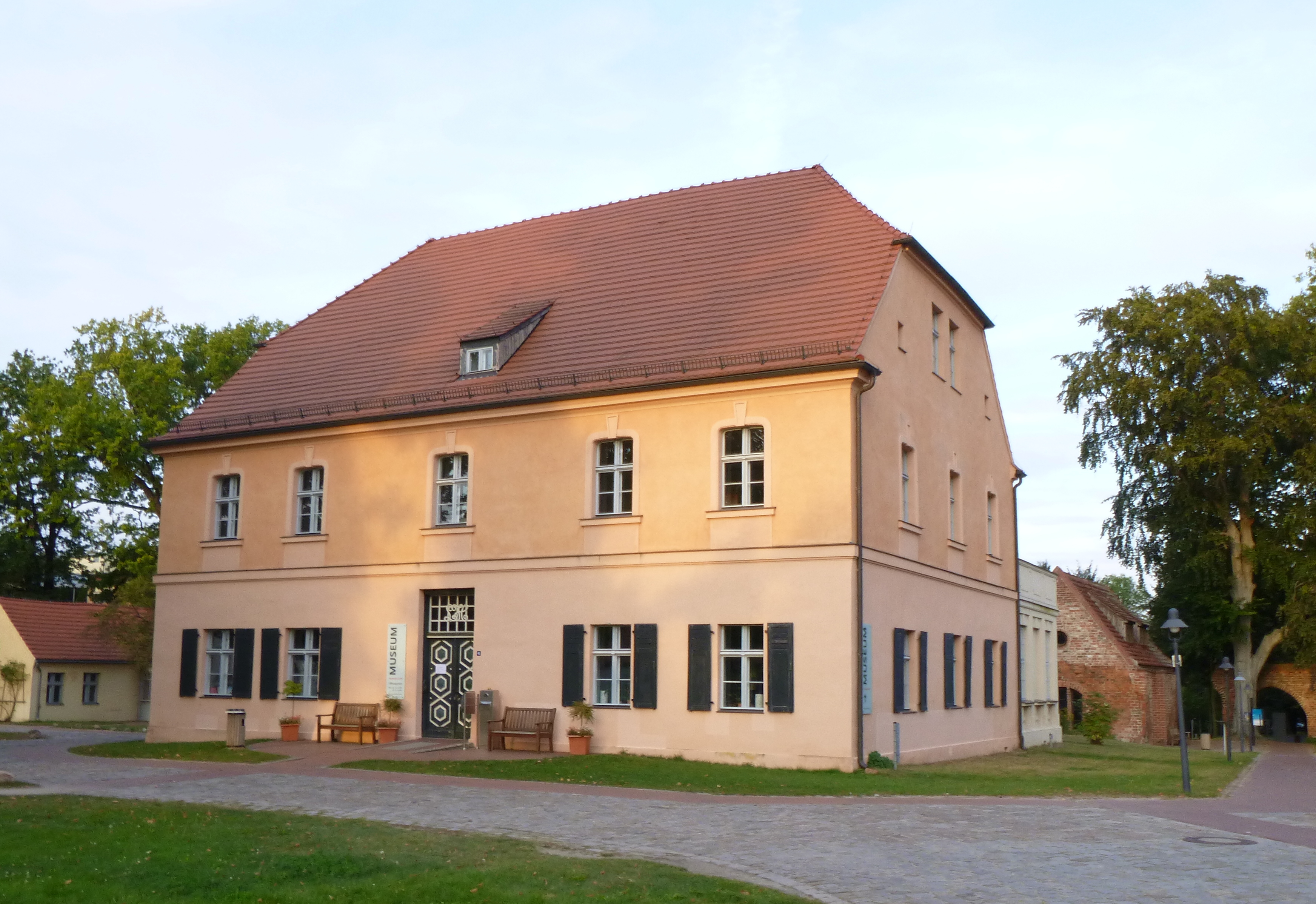 Kloster Lehnin m Herbst